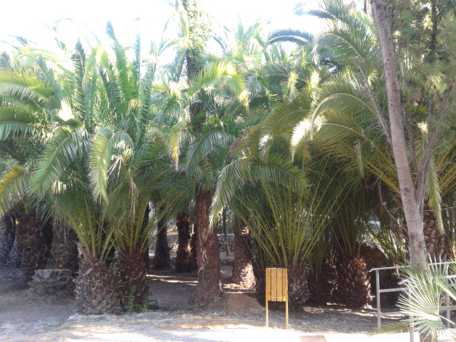 Vue intérieure des jardins Winter